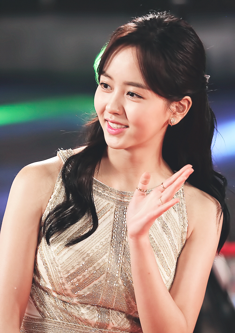 161231 KBS연기대상 김소현 직찍